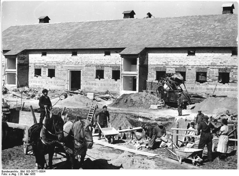 Fichtenberg, Baumaßnahmen in der LPG Zentralbild Lausitzer Rundschau 4 Motive-28.5.1955 LPG "Frieden" baut neue Ställe-Dieser Rinderstall und (im Vordergrund) die Jauchegrube sollen bis zum 1. August 1955 fertiggestellt sein. Weiter baut sich die LPG "Frieden" in Fichtenberg, Kreis Liebenwerda, einen Abferkelstall und zwei Schweinemastställe.